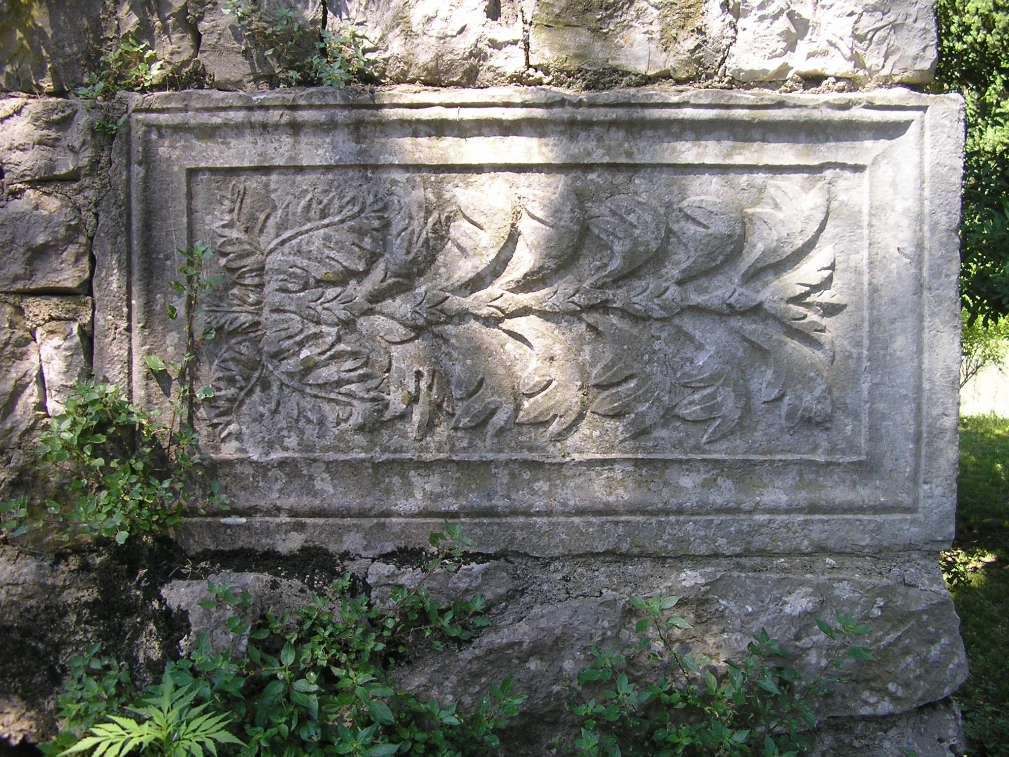 Ortostat na sjevernim vratima